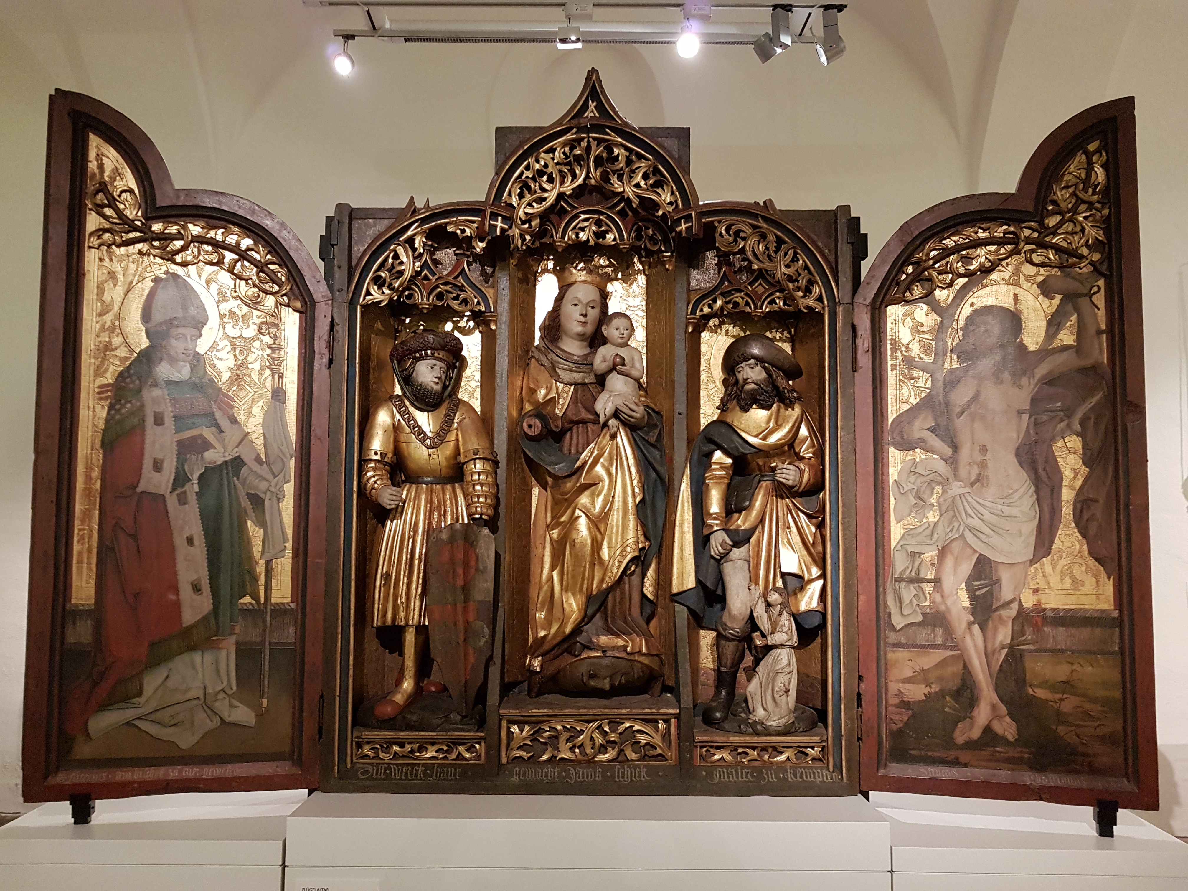 Kempten, Alpinmuseum, Mittelalter-Sammlung, Flügelaltar des Jakob Schick v. 1515.